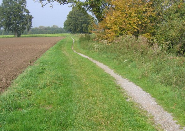 Ein Pättken in der Nähe von Havixbeck